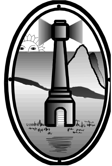 Escudo oficial de la Municipalidad de Necochea